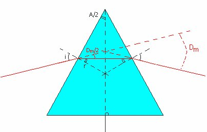 Géométrie du minimum de déviation dans un prisme